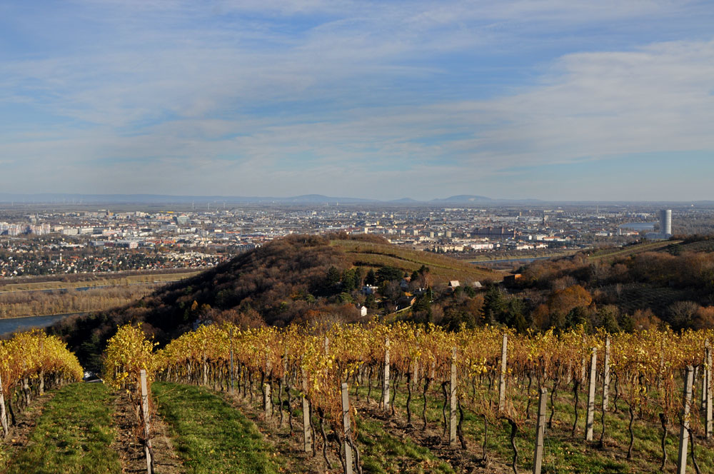 Burgstall nahe dem Kahlenbergerdorf.